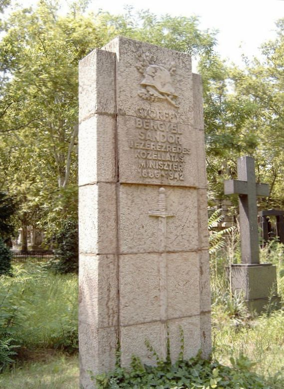 Győrffy-Bengyel Sándor, Bengyel (1886. február 15. – Budapest, 1942. június 14.) vezérezredes, a Bárdossy-kormány közellátásügyi tárca nélküli miniszterének sírja. Kerepesi temető: 18/1-2-37 [szobrász: Györgyi Dénes].